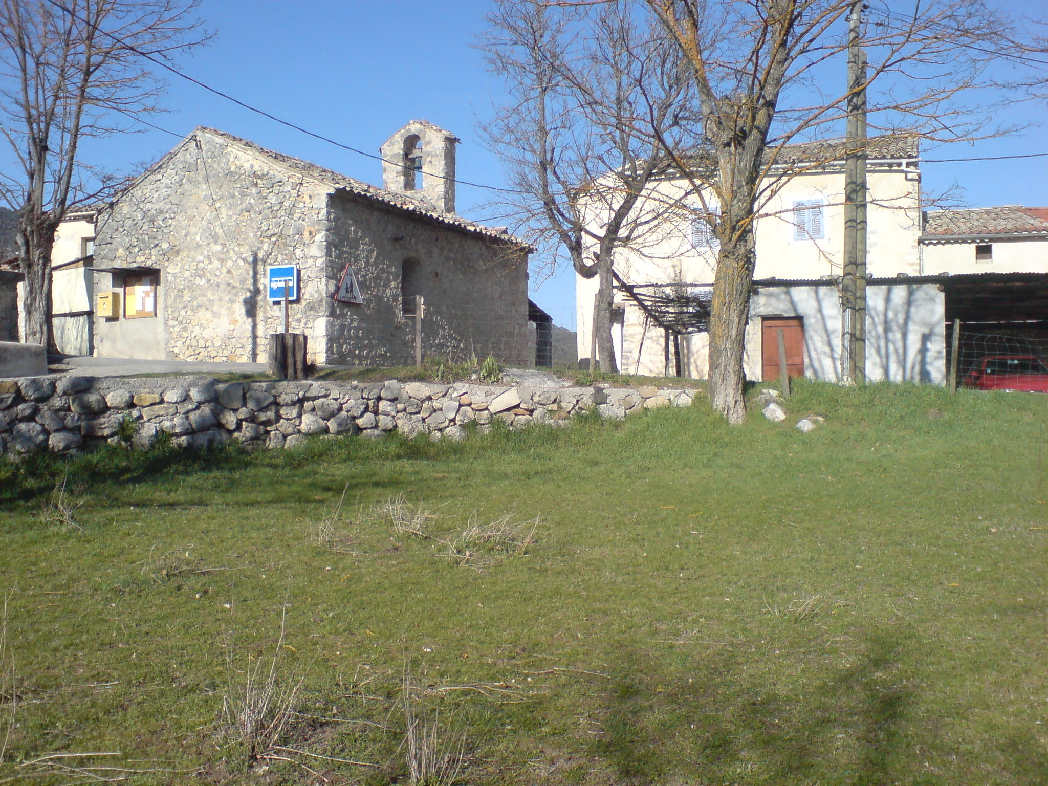 Chapelle au village de Saint-Pierre, Alpes-de-Haute-Provence